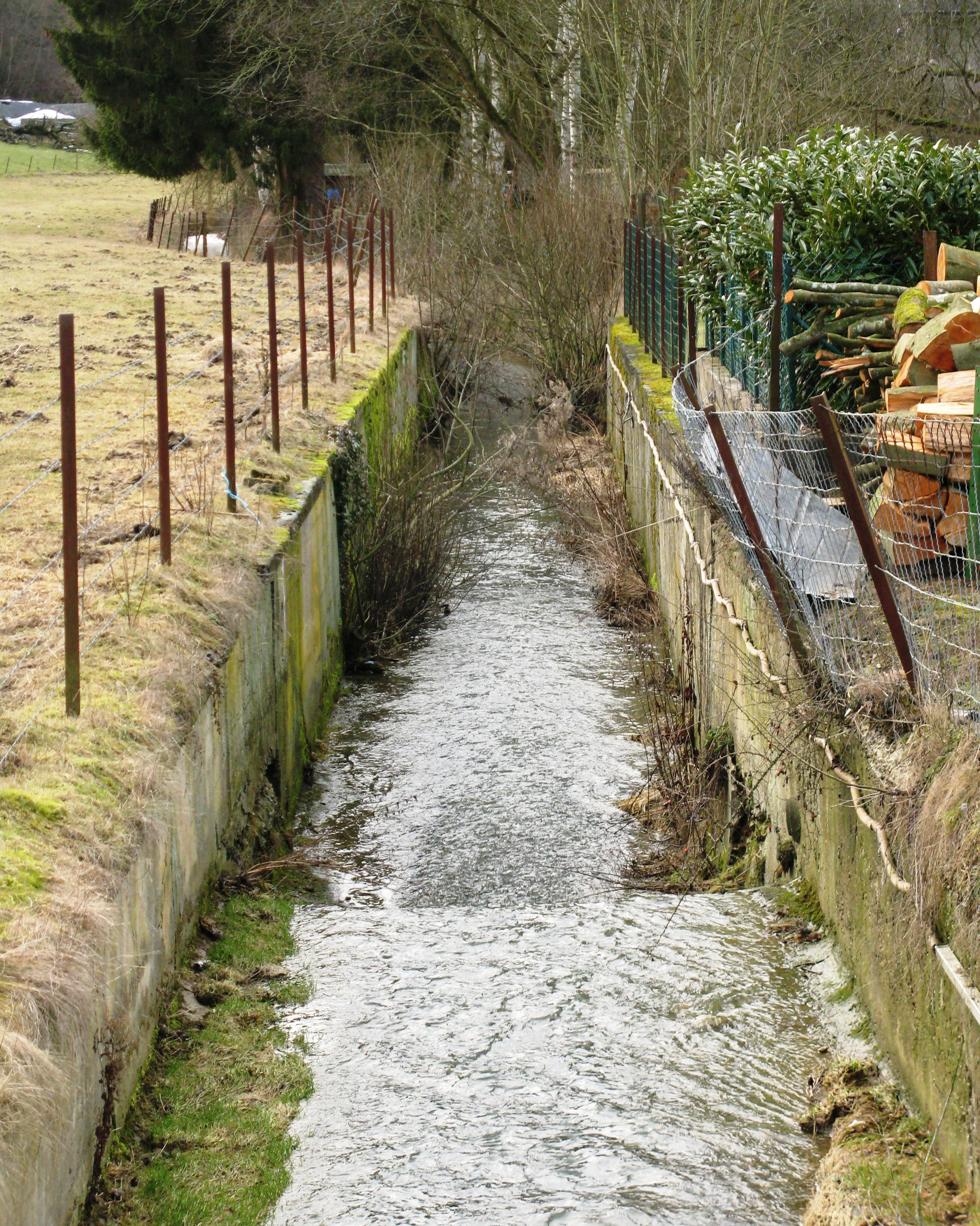 D'Giewelerbaach, am Ausgank vu Käerch. Kategorie:Baachen zu Lëtzebuerg Giewelerbaach